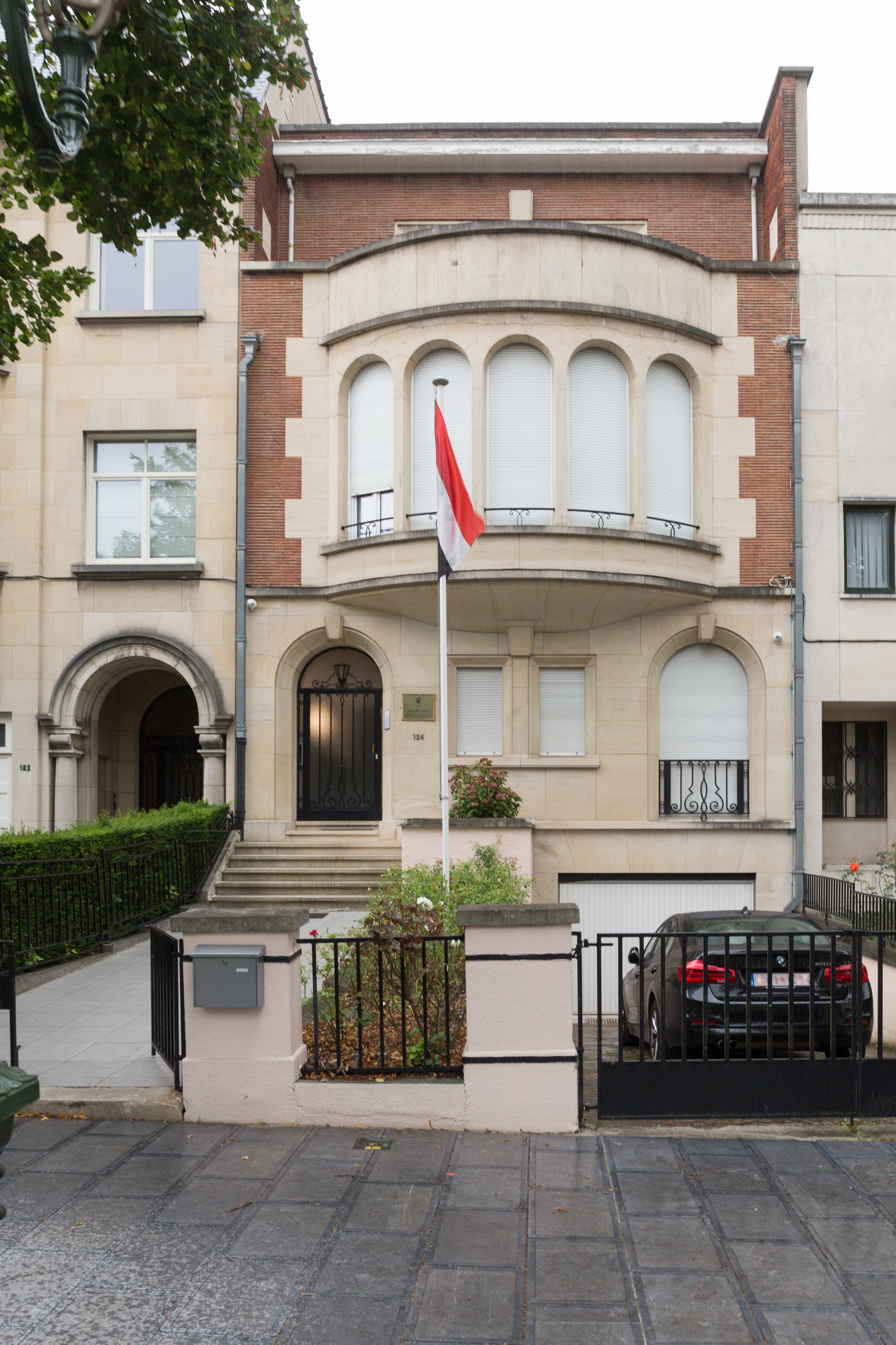 Ambassade du Soudan en Belgique, Avenue Franklin Roosevelt 124, Bruxelles.